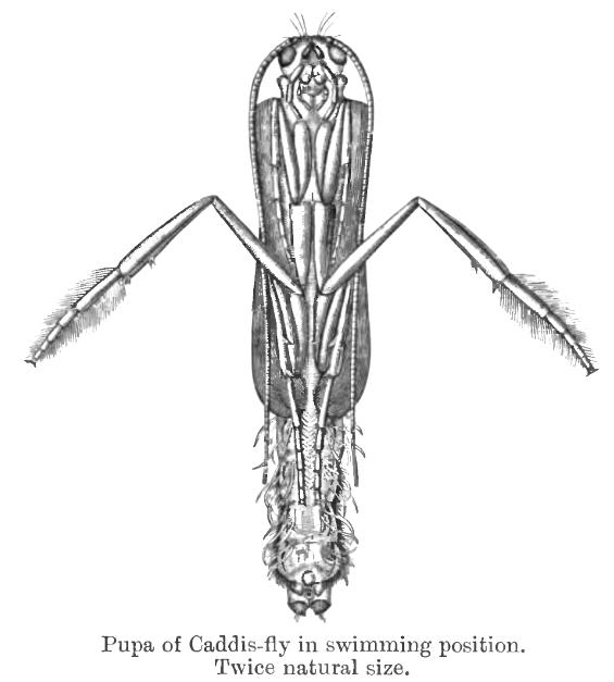 Caddis fly pupa